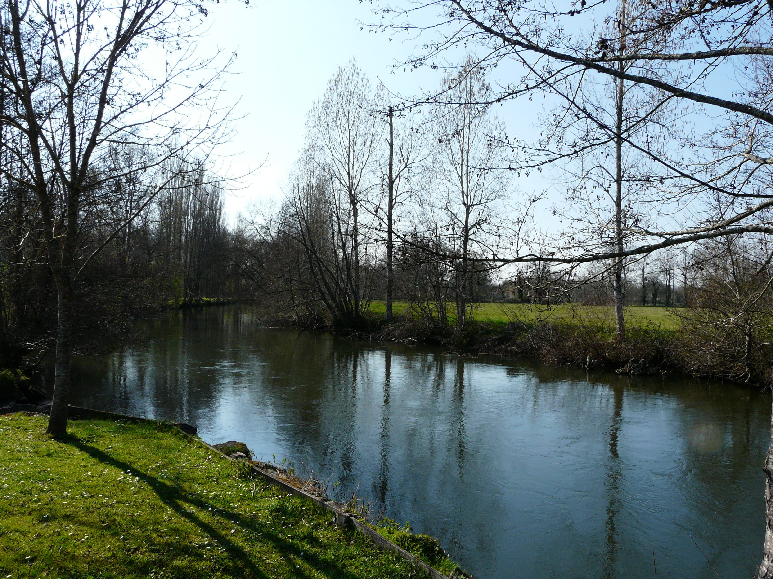 La Dronne au lieu-dit Beauclair entre Douchapt (au premier plan) et Saint-Victor (sur la rive opposée), Dordogne, France. Vue prise en direction de l'aval.